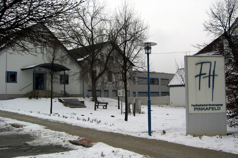 The Fachhochschule in Pinkafeld, Burgenland, Austria